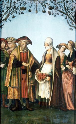 Titel: Rosenwunder der heiligen Elisabeth von Thüringen [1] Medium: Tafelbild Provenienz: Steiermark Technik: Tafelmalerei Inhalt: Rosenwunder der Hl. Elisabeth von Thüringen Entstehungszeit um 1525. Herkunft: Mariahof Beschreibung: Diese Tafelbild aus der ersten Hälfte des 16. Jahrhunderts zeigt das Rosenwunder der Hl. Elisabeth von Thüringen. Sie wird von ihrem Mann, dem Landgrafen Ludwig von Thüringen, ertappt, als sie zur Zeit einer Hungersnot Lebensmittel an Arme verteilen wollte. Doch als ihr Mann die dafür in ihrer Schürze verborgenen Sachen sehen will, haben sich diese in Rosen verwandelt.